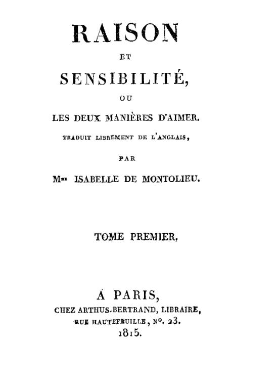 Page de titre de la première édition de Raison et Sensibilité ou n'apparait que le nom de la traductrice-adaptatrice